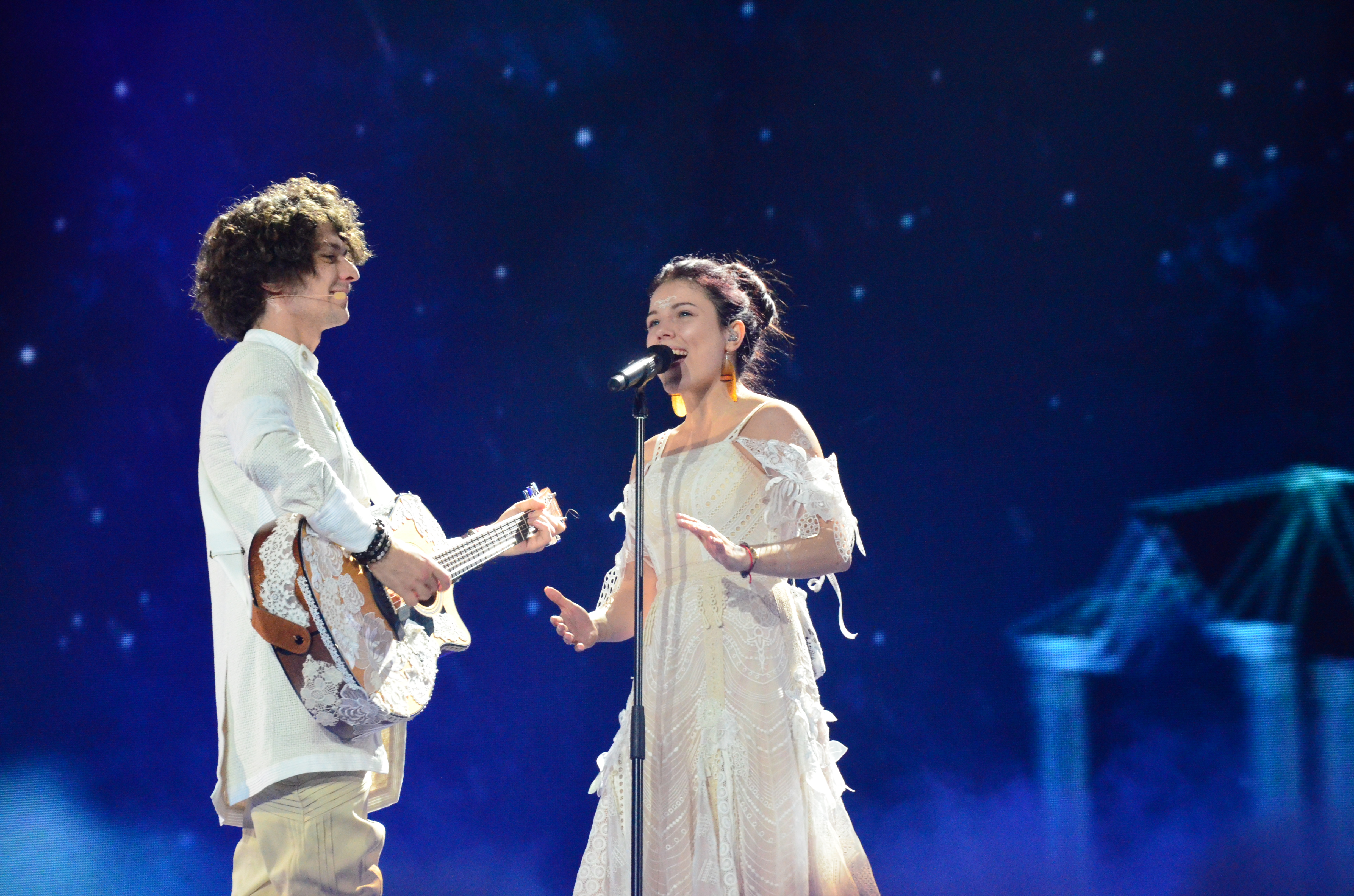 12 травня. Генеральна репетиція фіналу Євробачення 2017. NaviBand, Belarus.